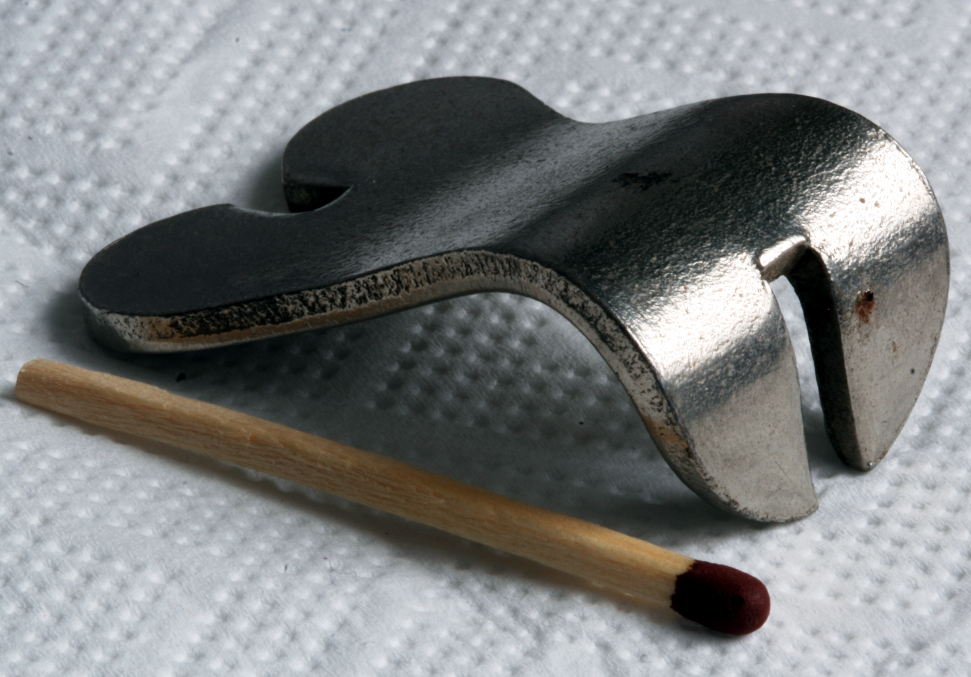 Fahrrad-Speichenschlüssel